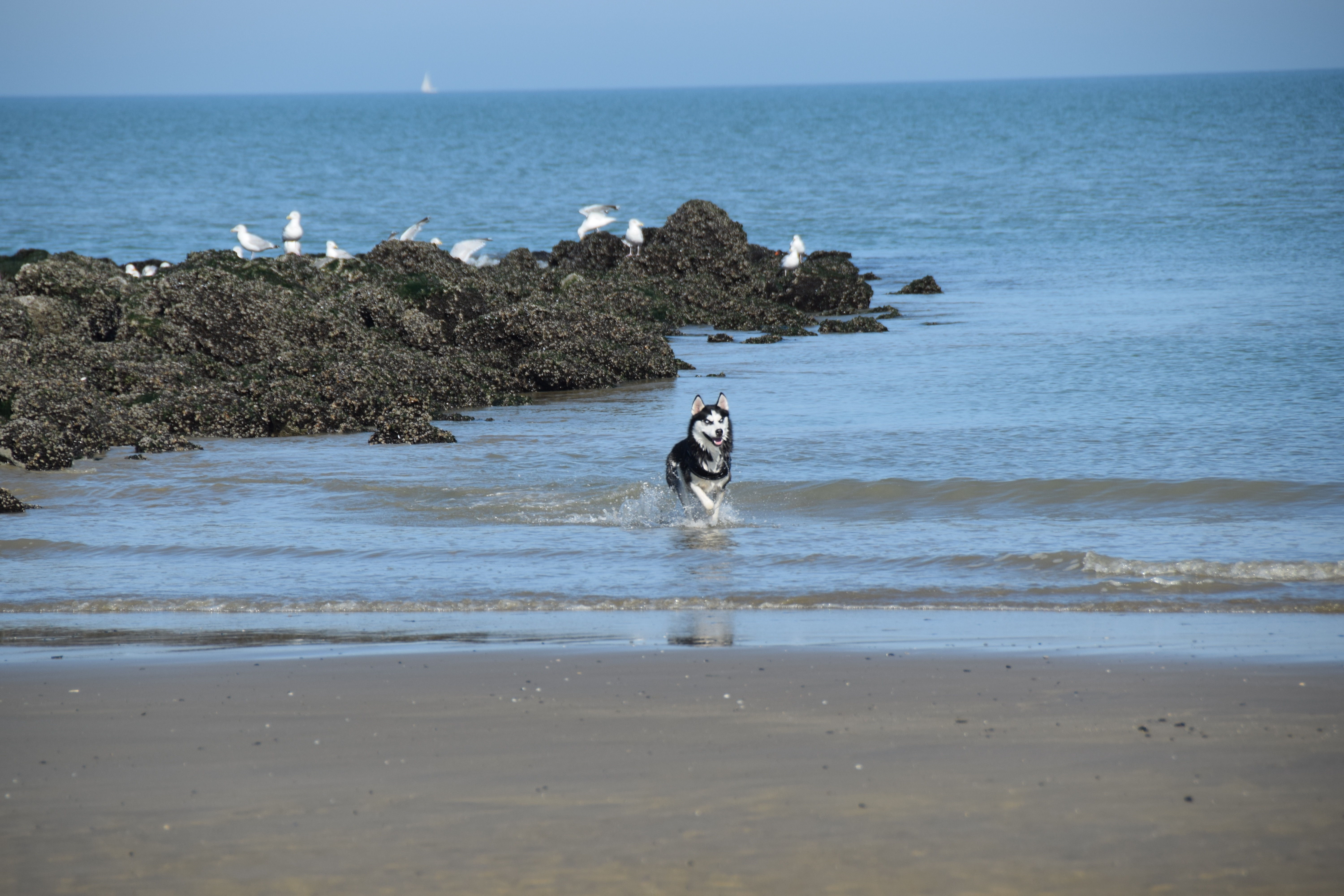 Leïko à Raversijde